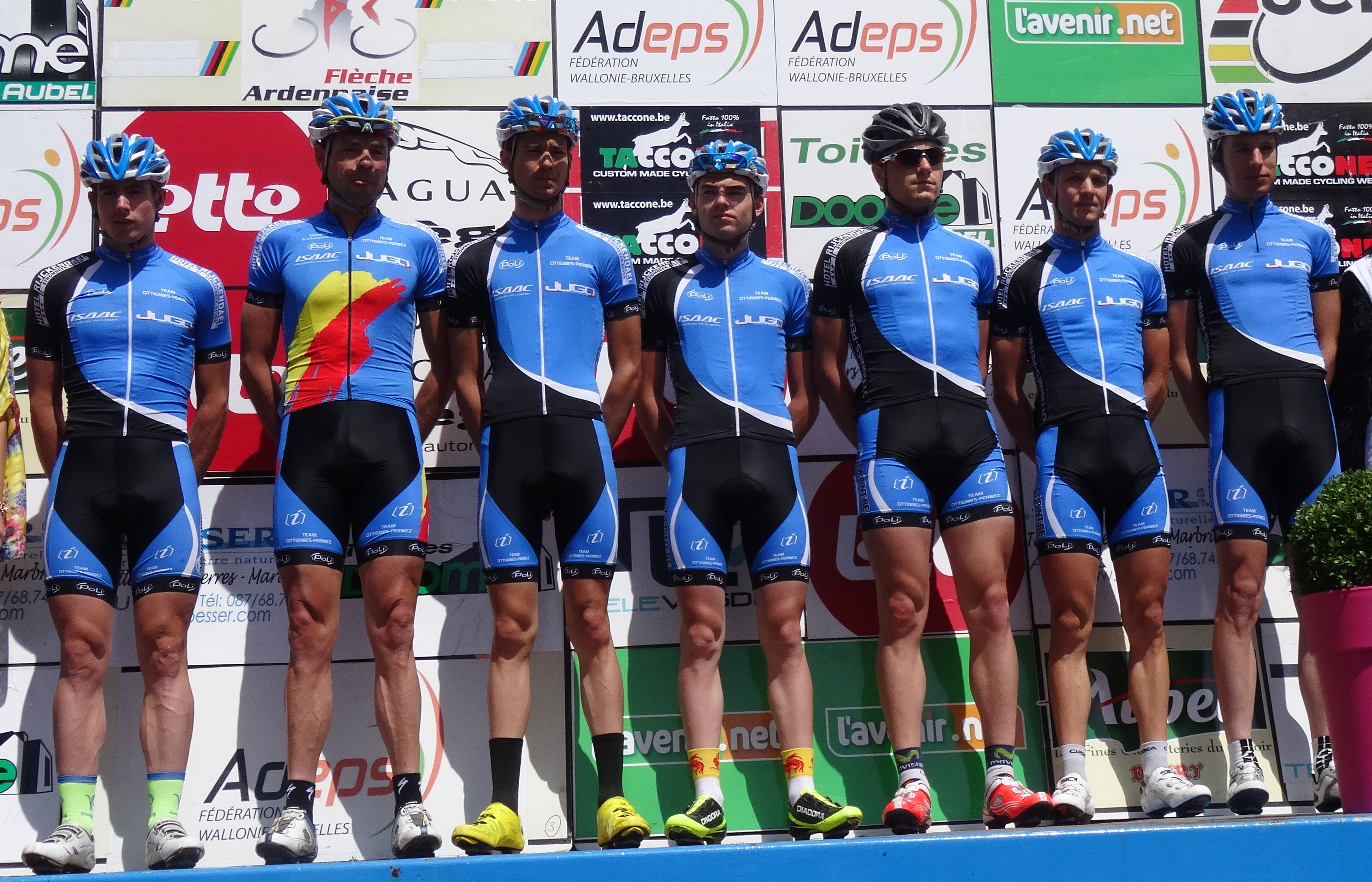 Reportage photographique réalisé le dimanche 22 juin à l'occasion du départ et de l'arrivée de la Flèche ardennaise 2014 à Herve, Belgique.